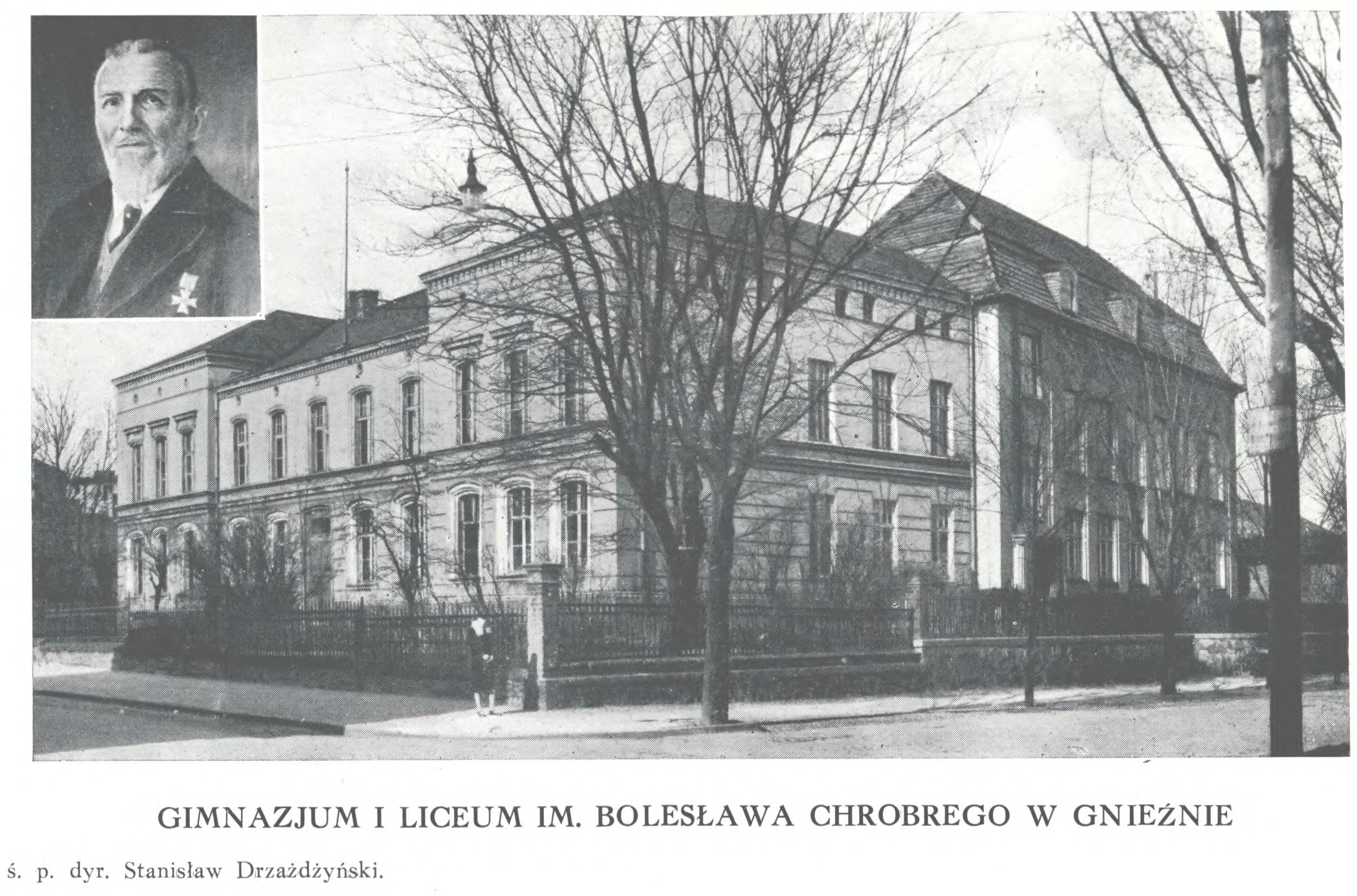 Gmach Państwowego Gimnazjum i I LO im. B Chrobrego w Gnieźnie i portret- St. Drzażdżyńskiego dyrektora szkoły w latach 1919-25